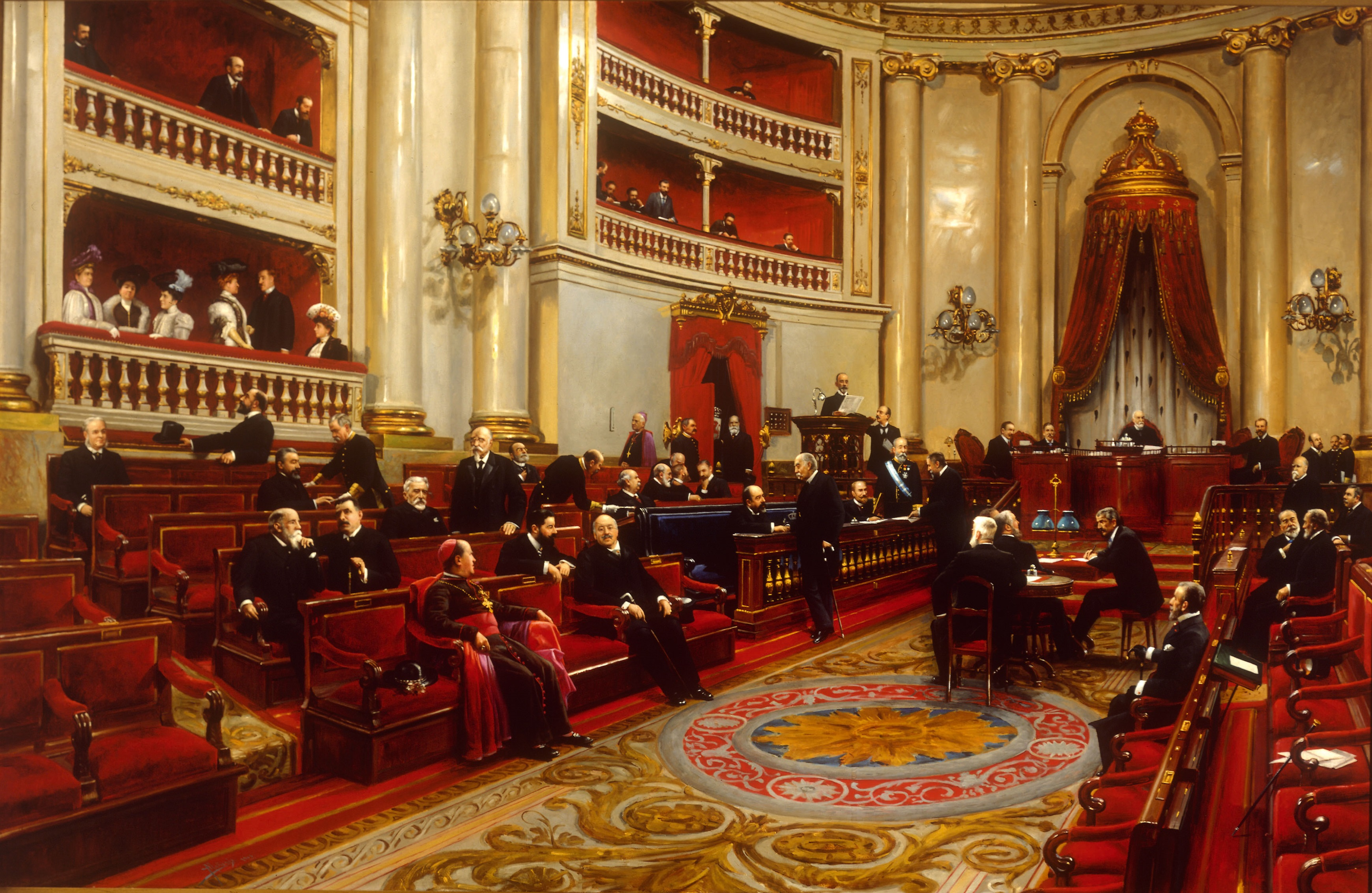 El lienzo representa el Salón de Sesiones del Palacio del Senado de España en 1906, durante el reinado de Alfonso XIII, en plena actividad parlamentaria.